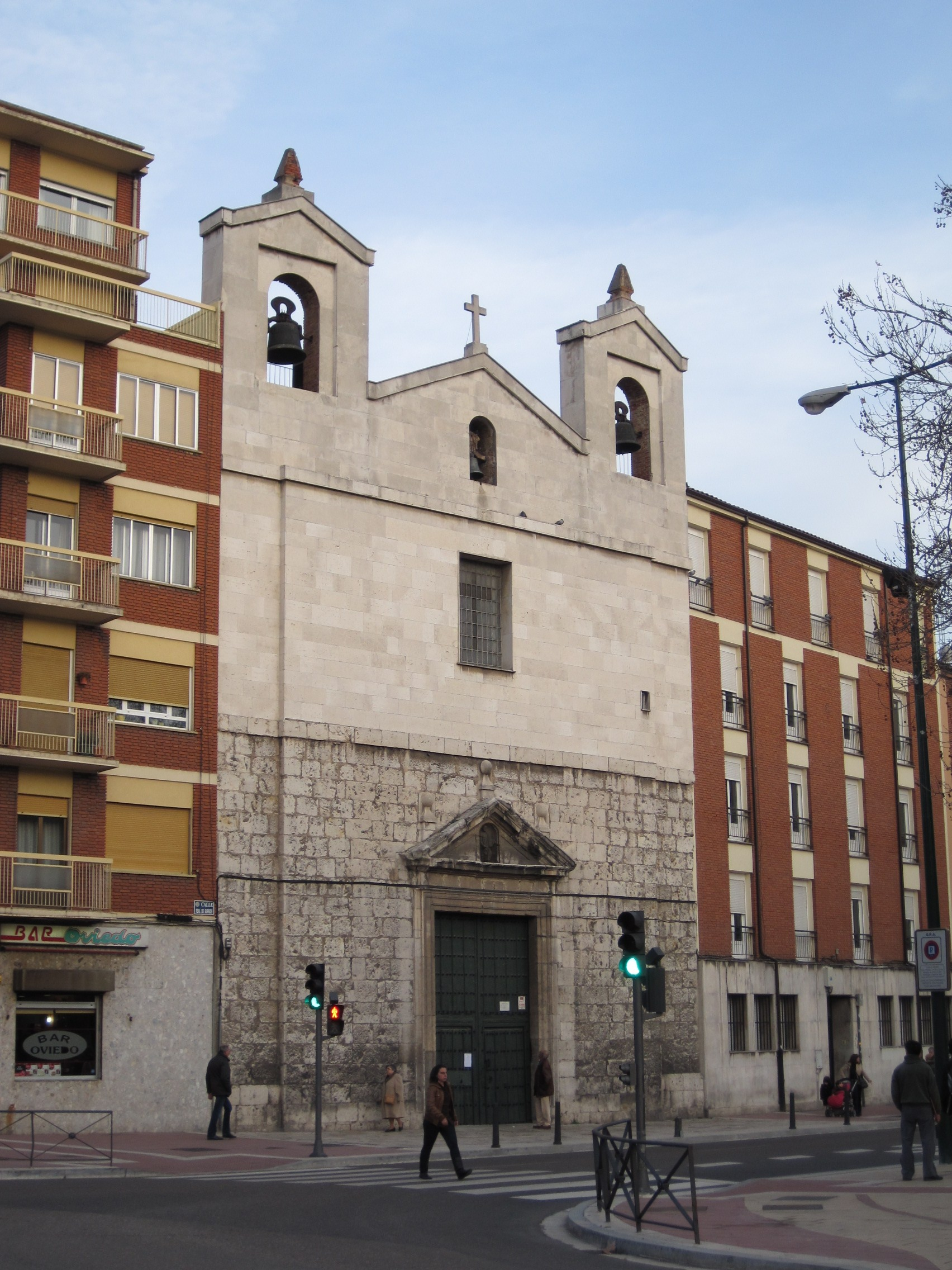 Fachada de la iglesia parroquial de San Pedro Apóstol, Valladolid (España).